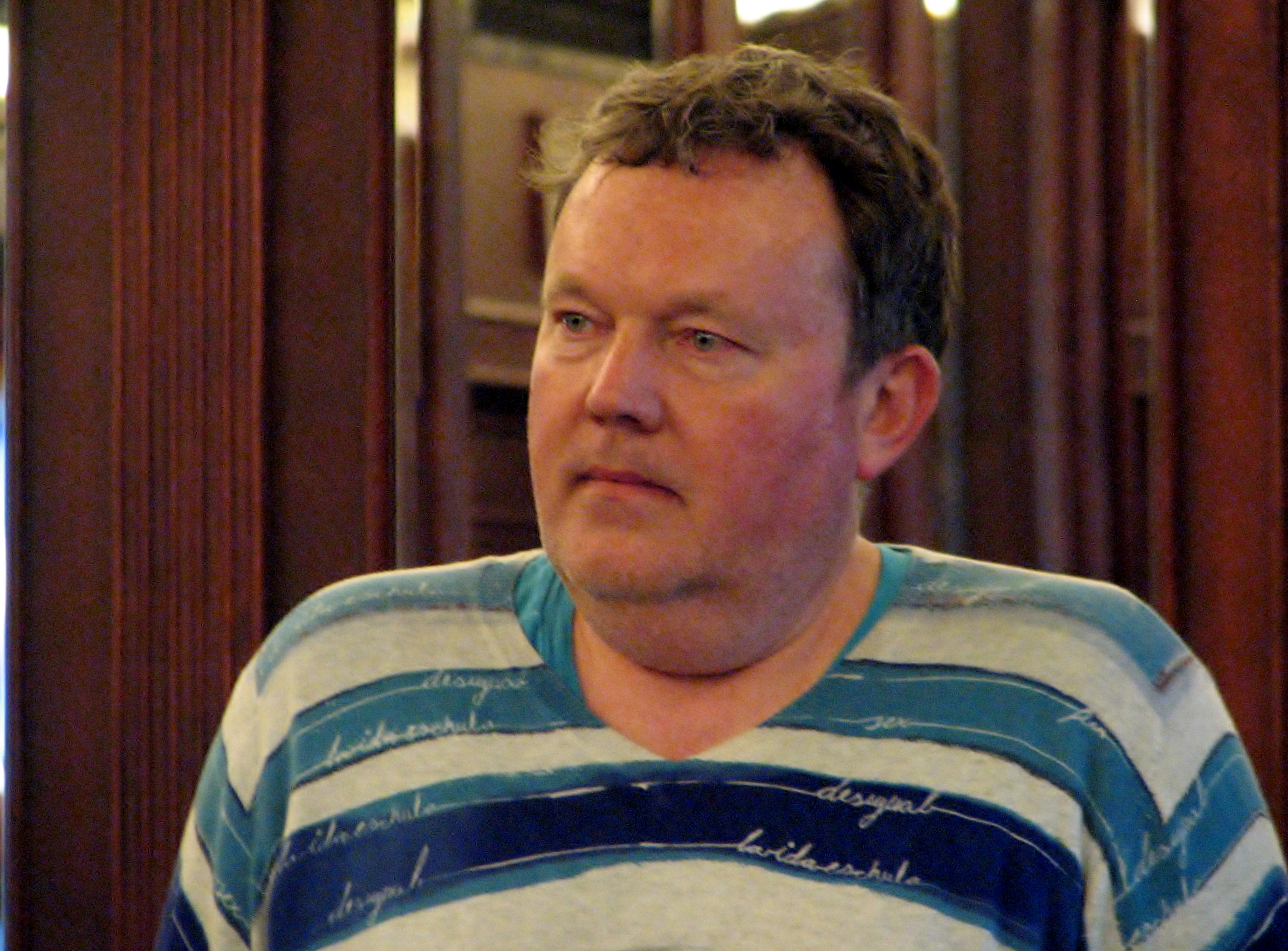 Sulev Oll kirjandusfestivali HeadRead raames Maiasmoka kohvikus